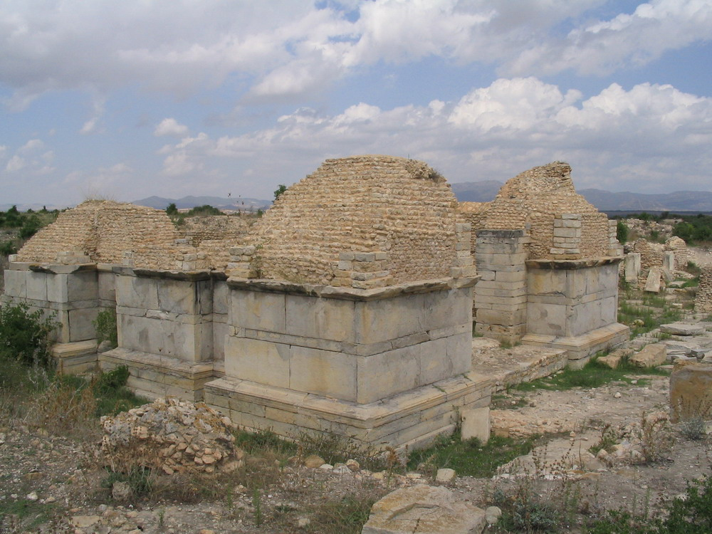 Temple